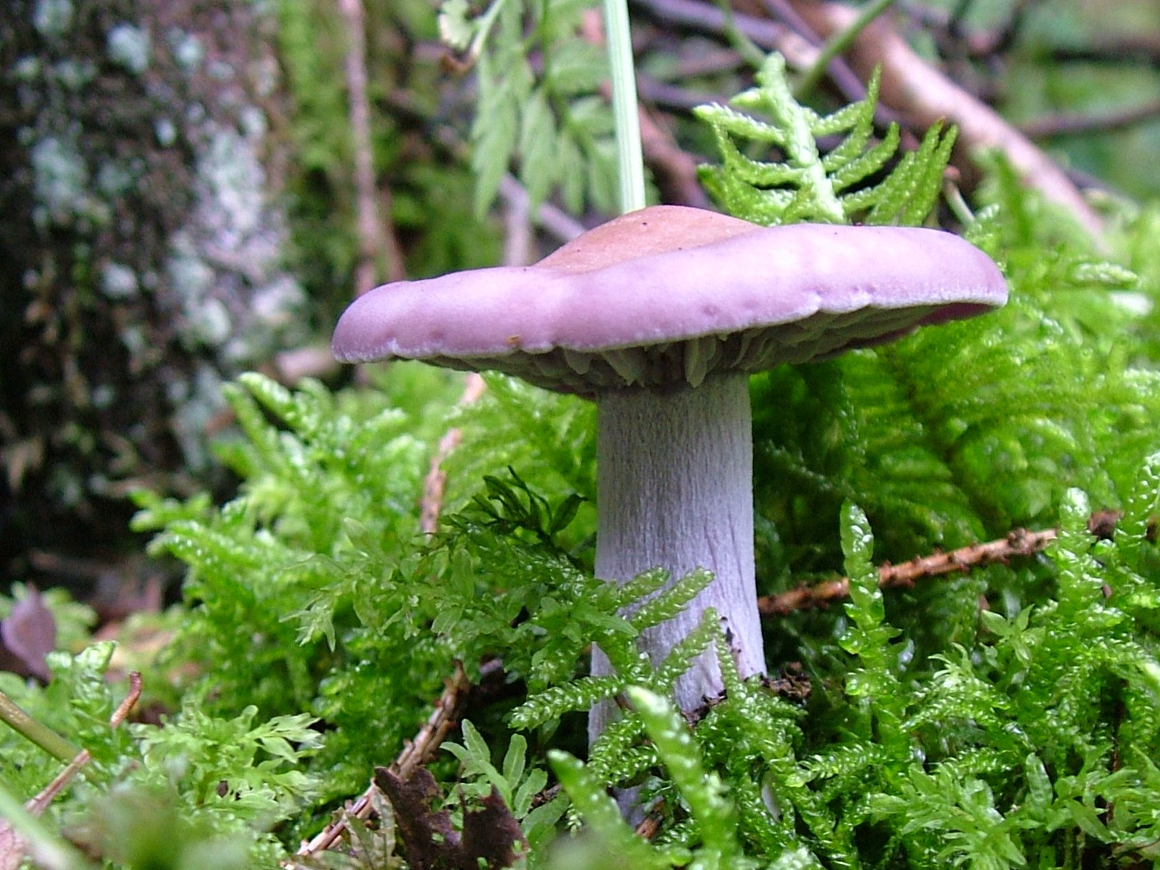 Lepista nuda by Annabel, Belgium 2006